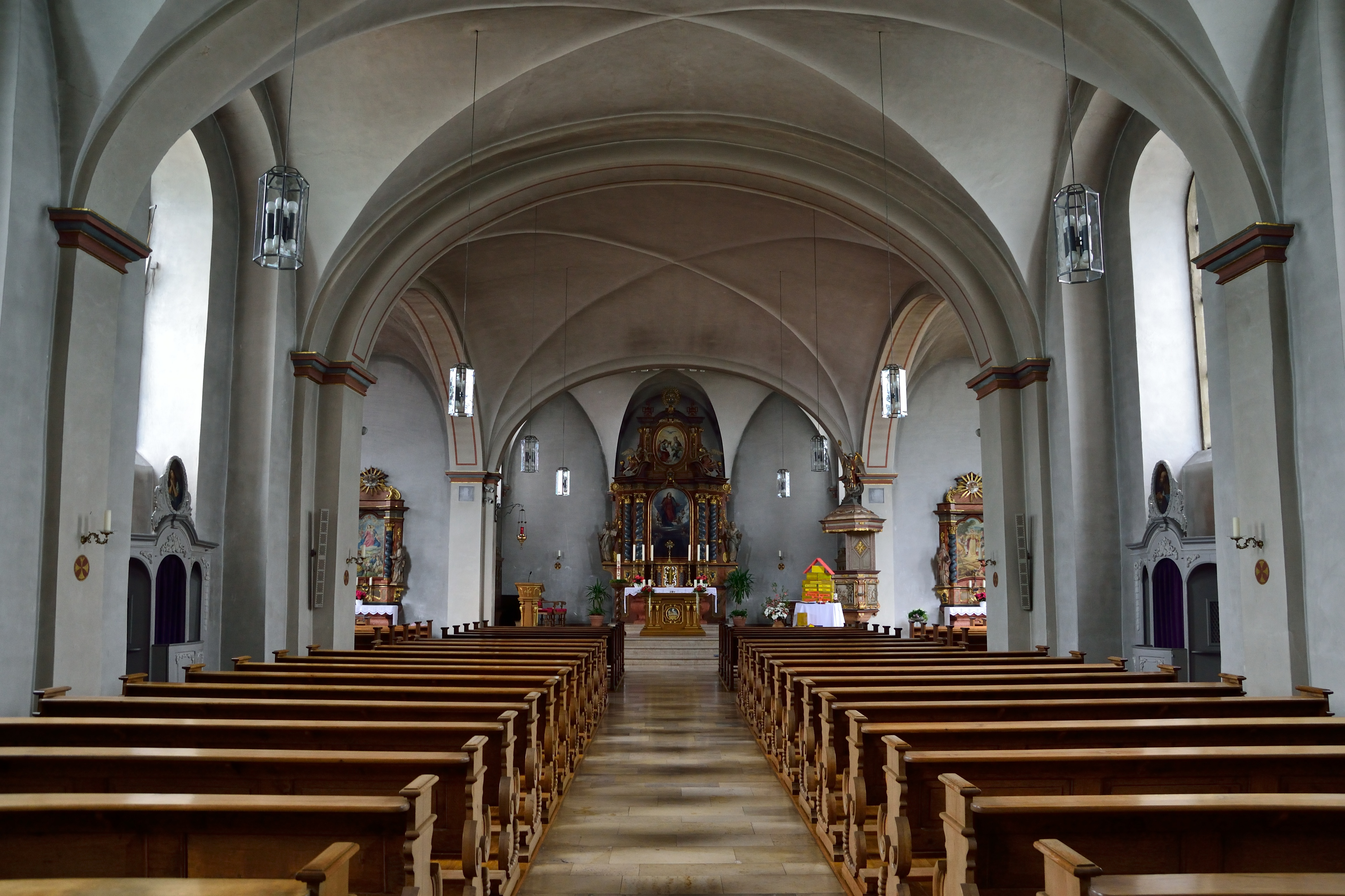 Inneres der Kirche "St. Simon und Judas Thaddäus" in Borchen-Etteln